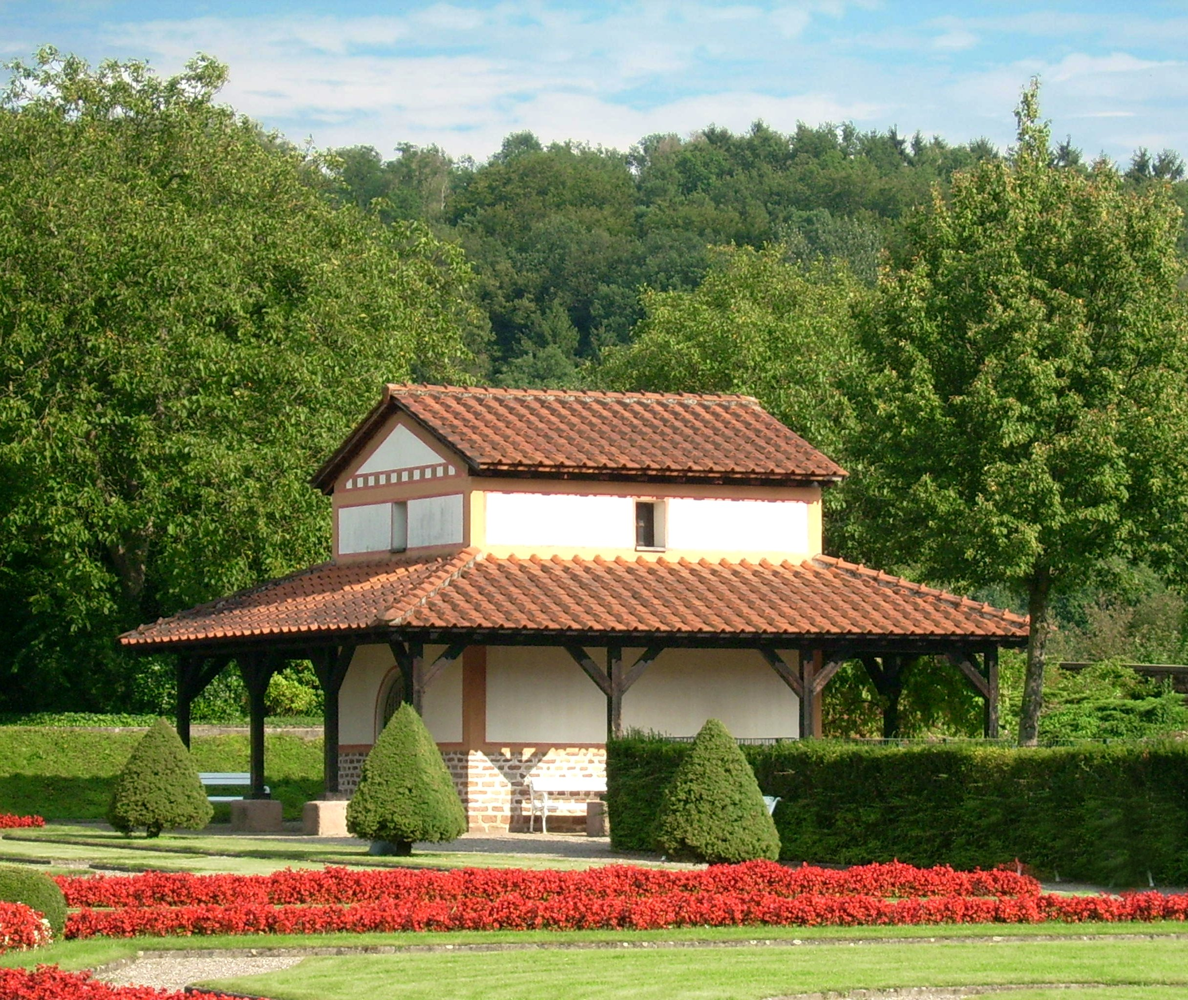 Römisch-Gallischer Tempel in Schwarzenacker, Iupiter, roman